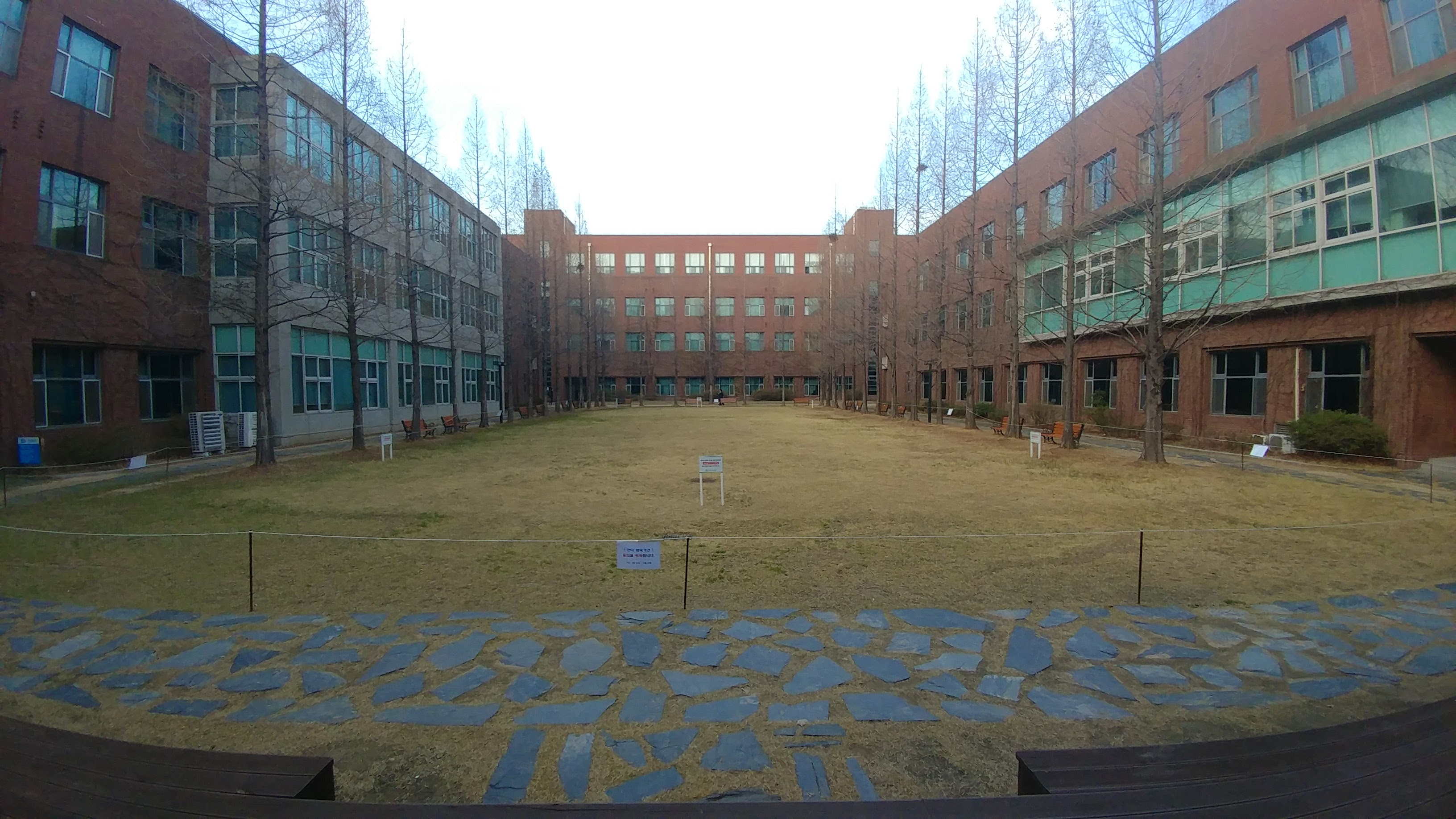 왼쪽에서 부터 경기과학기술대학교 창조A관, C관, B관.